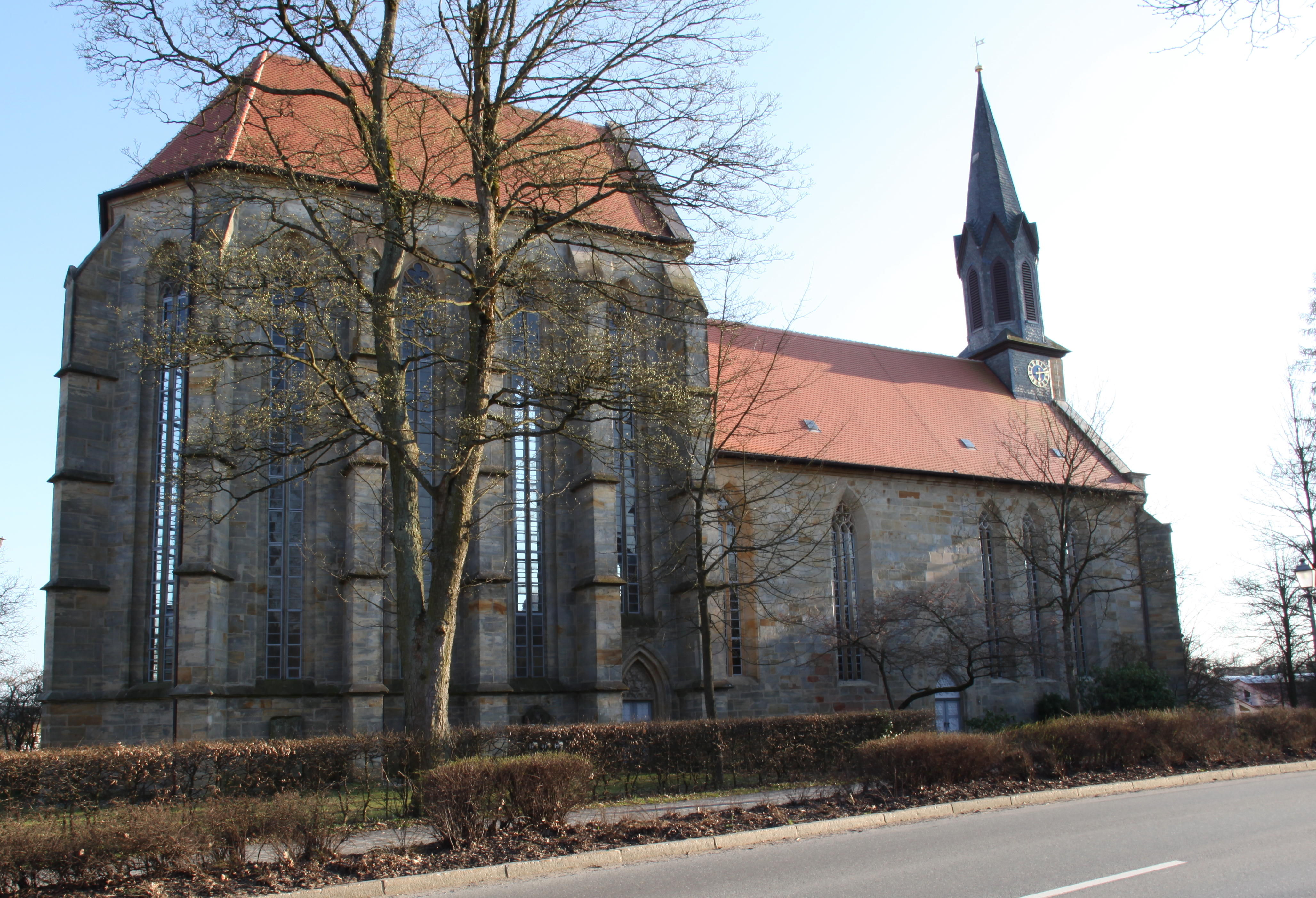 Klosterkirche Sonnefeld, Landkreis Coburg